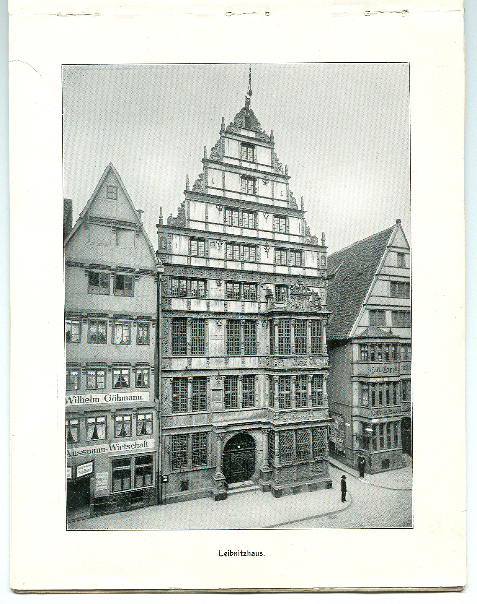 „Hannover – 26 Ansichten nach künstlerischen Aufnahmen“ von Karl F. Wunder. – Leibnitzhaus.